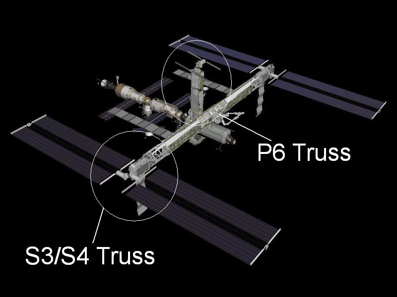 Blik op de veranderingen aan het ISS na STS-117